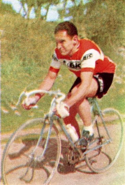 Jean Stablinski en 1967 - Campioni dello Sport 1967-1968, n°256